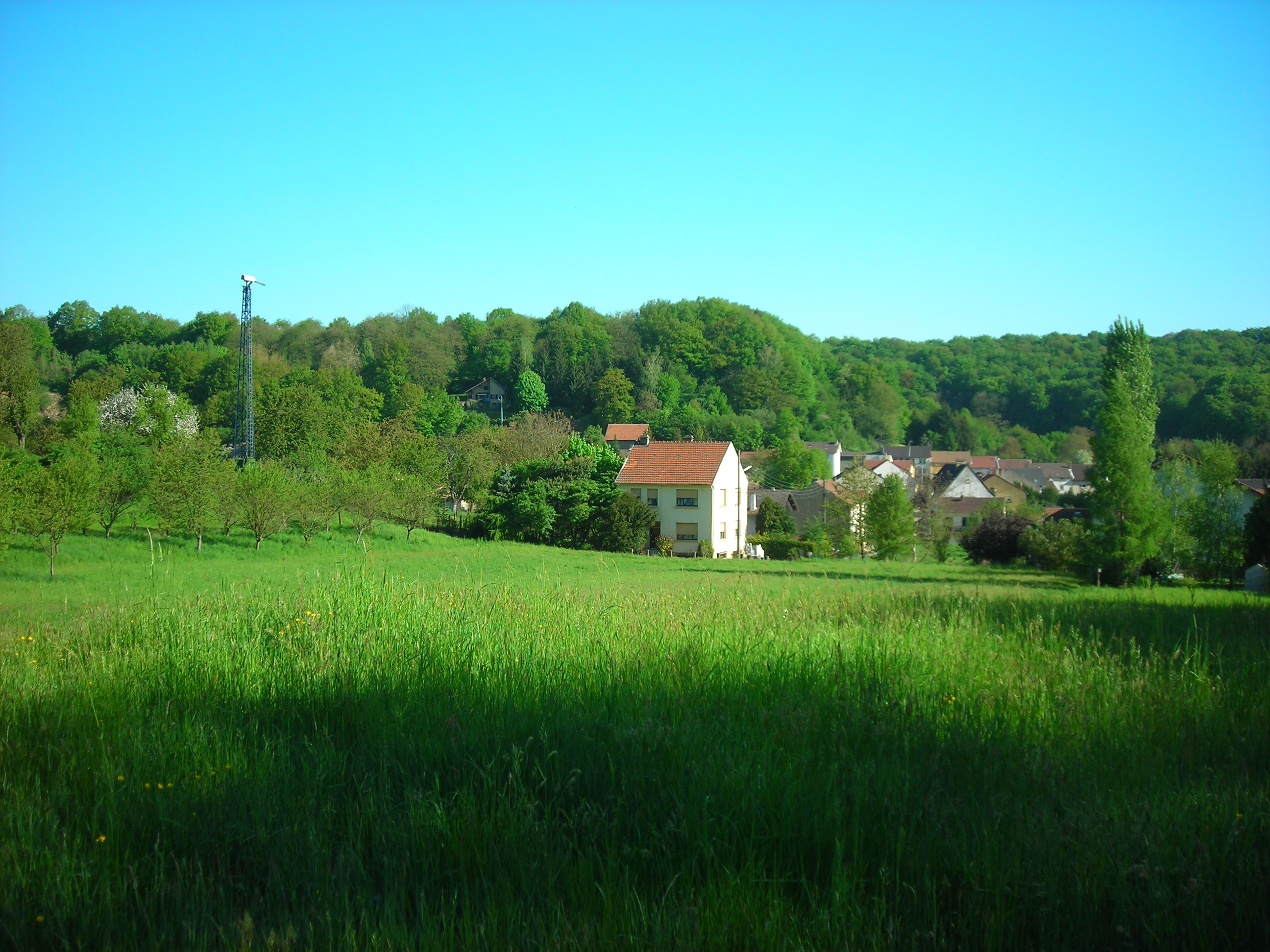 Guerting